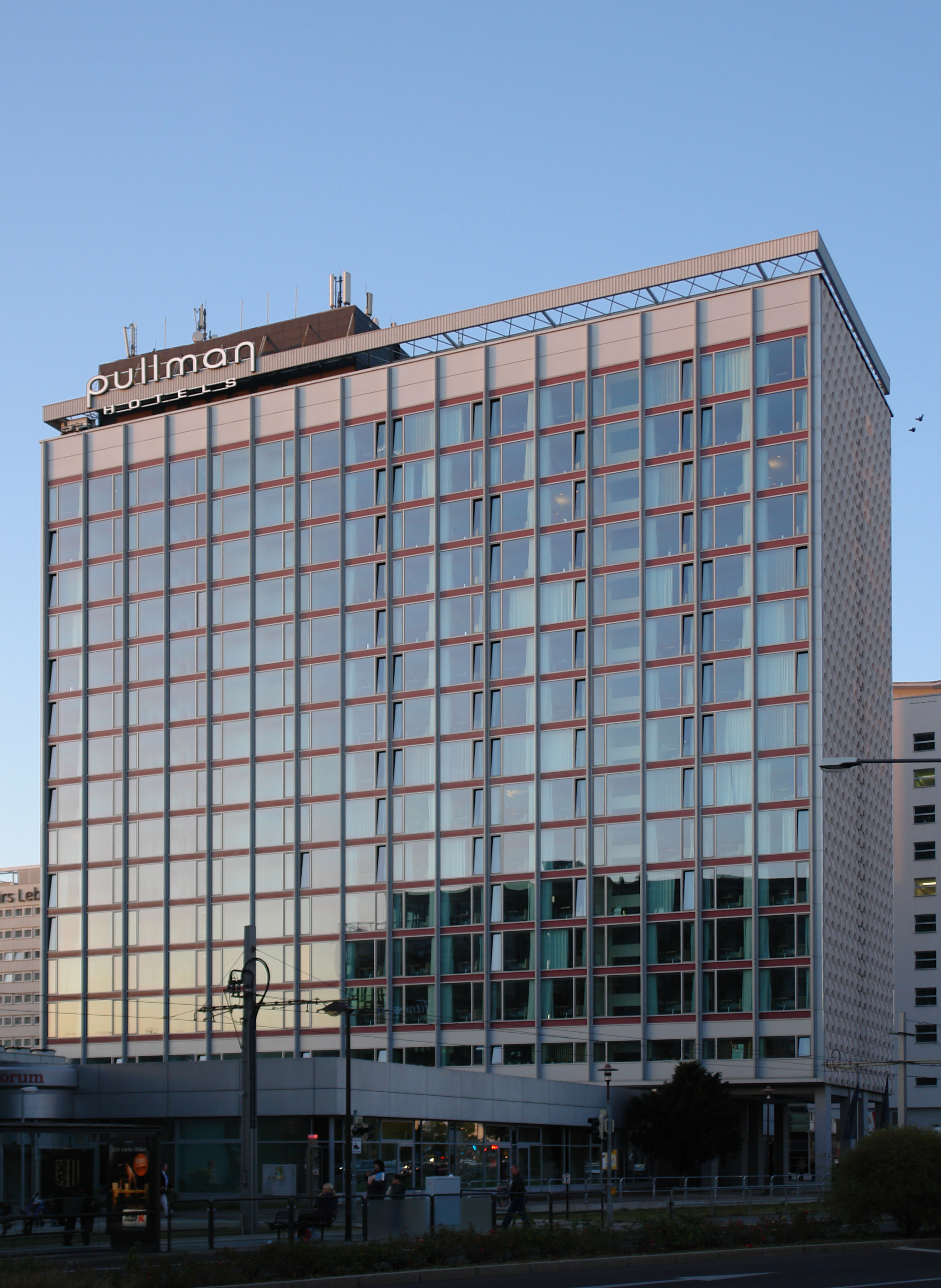 Das Pullmann Hotel auf der Prager Straße in Dresden (ehem. Hotel Newa)